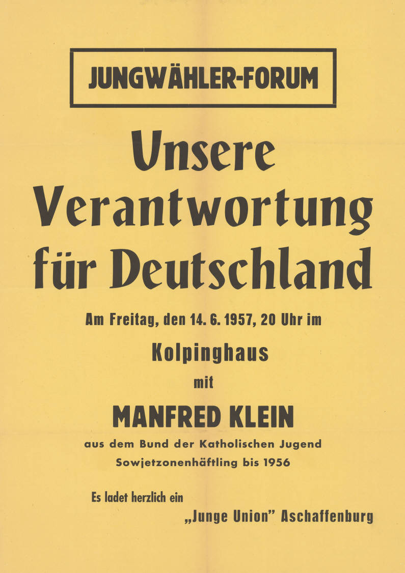 Jungwähler-Forum Unsere Verantwortung für Deutschland ... mit Manfred Klein aus dem Bund der Katholischen Jugend Sowjetzonenhäftling bis 1956 "Junge Union" Aschaffenburg Plakatart: Ankündigungsplakat Auftraggeber: JU Aschaffenburg Objekt-Signatur: 10-028 : 1 Bestand: Plakate von Jugendorganisationen der Parteien ( 10-028) GliederungBestand10-18: Plakate von Jugendorganisationen der Parteien (10-028) » CDU » Veranstaltungsplakate A - Z Lizenz: KAS/ACDP 10-028 : 1 CC-BY-SA 3.0 DE